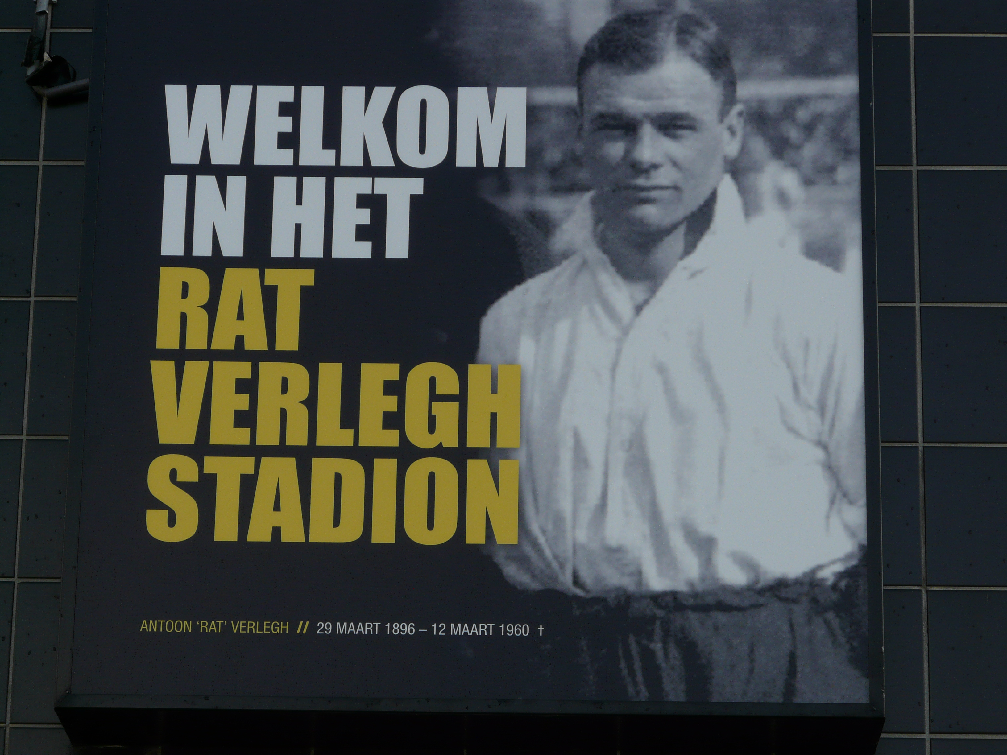 Afbeelding ingang Nac stadion